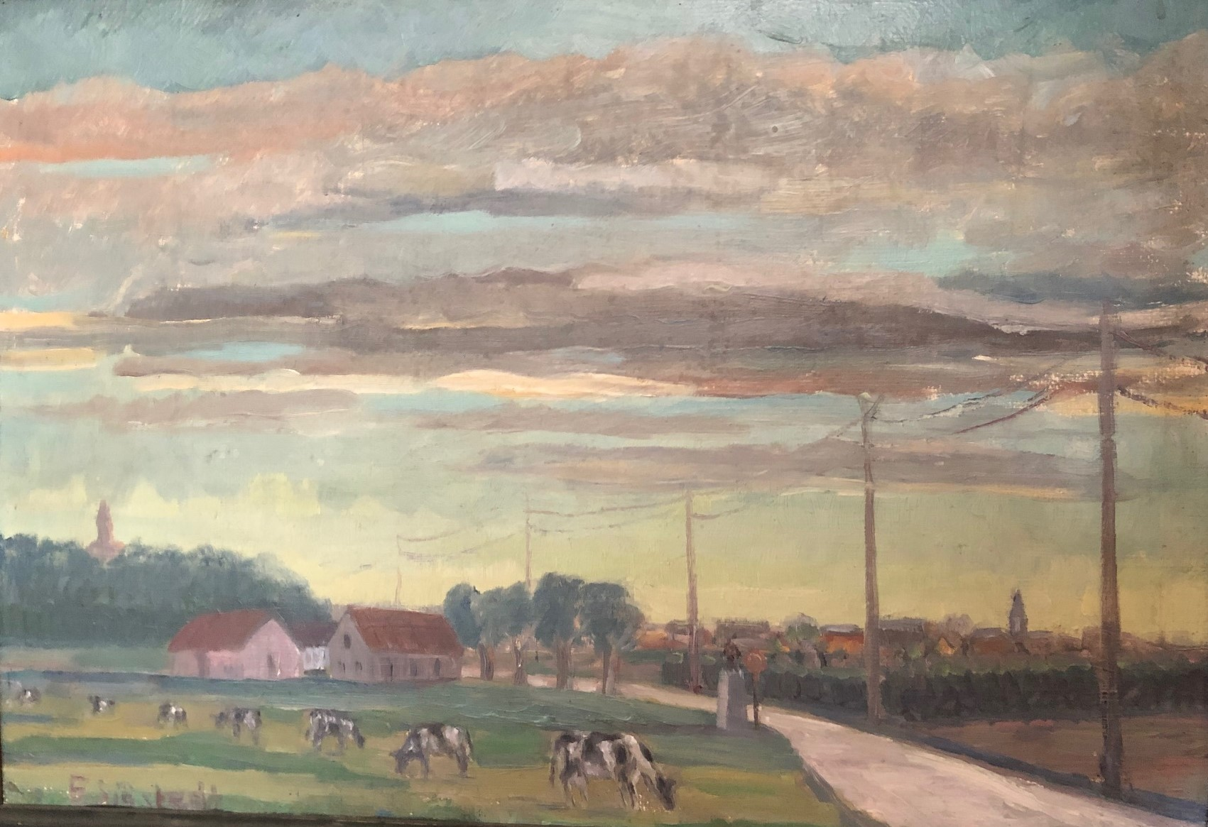 Landskap med kor